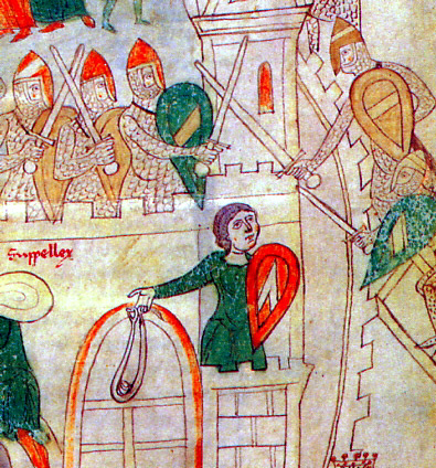 Fromboliere sulle mura di Salerno assalita dalle truppe imperiali